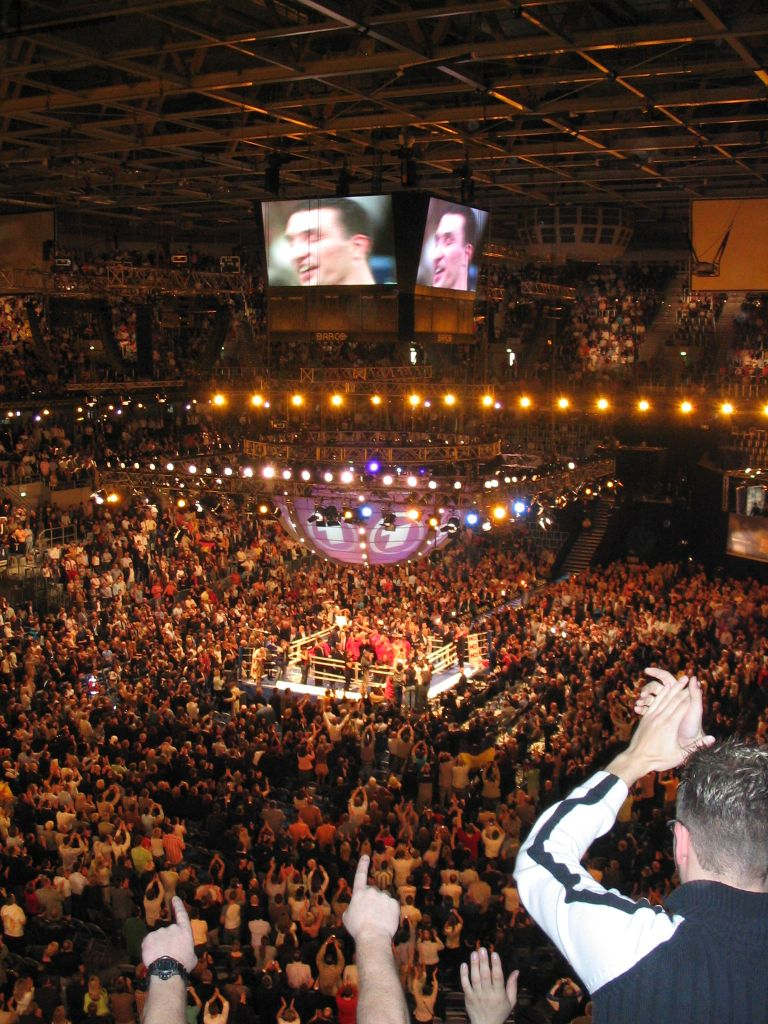 Beschreibung: Innenansicht der SAP Arena während des Schwergewichts-WM-Kampfes am 22. April 2006 Quelle: Selbst fotografiert Fotograf oder Zeichner: Steffen B. Datum: Mannheim, 23.04.2006